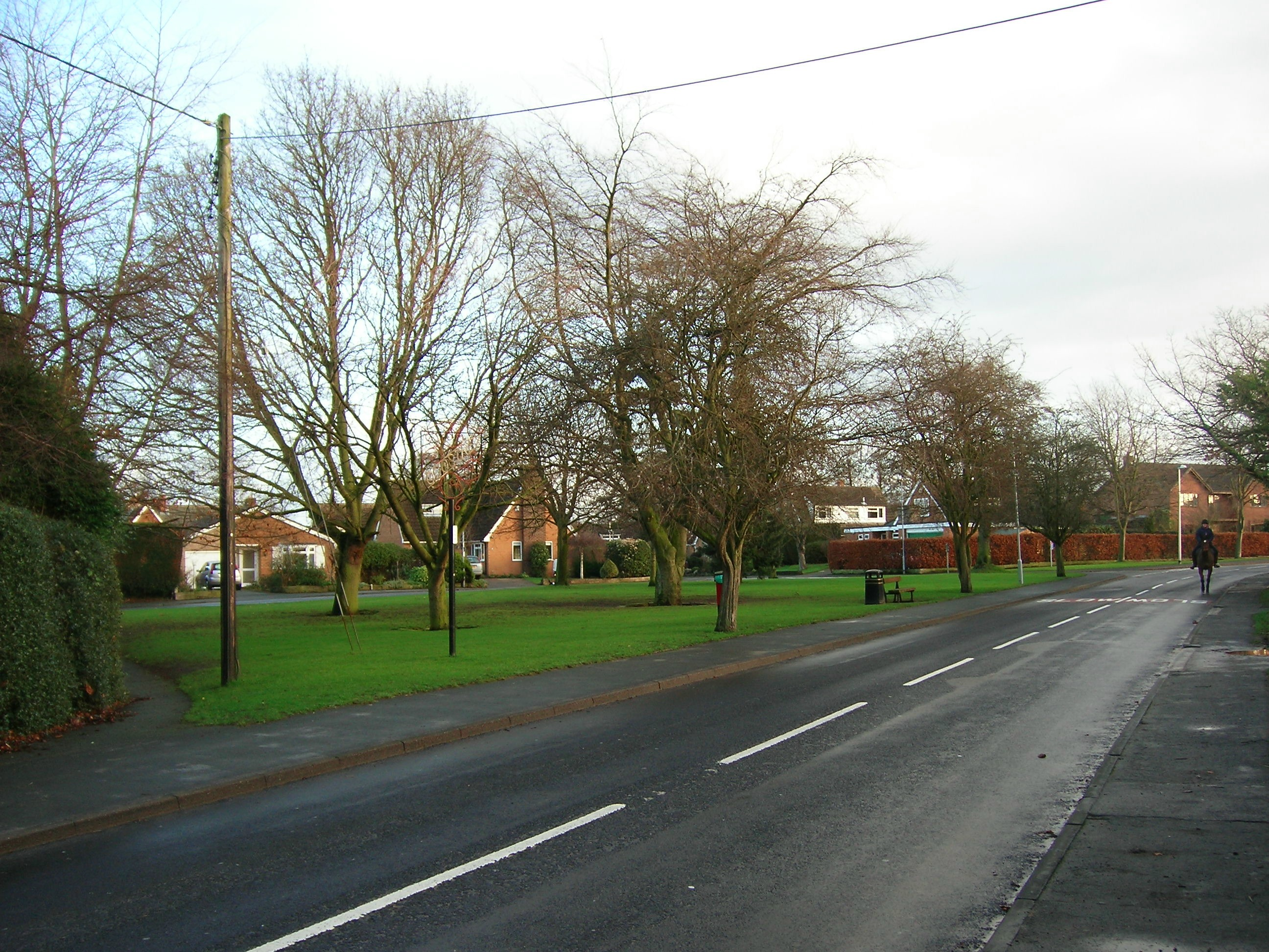 West Goostrey, view looking east